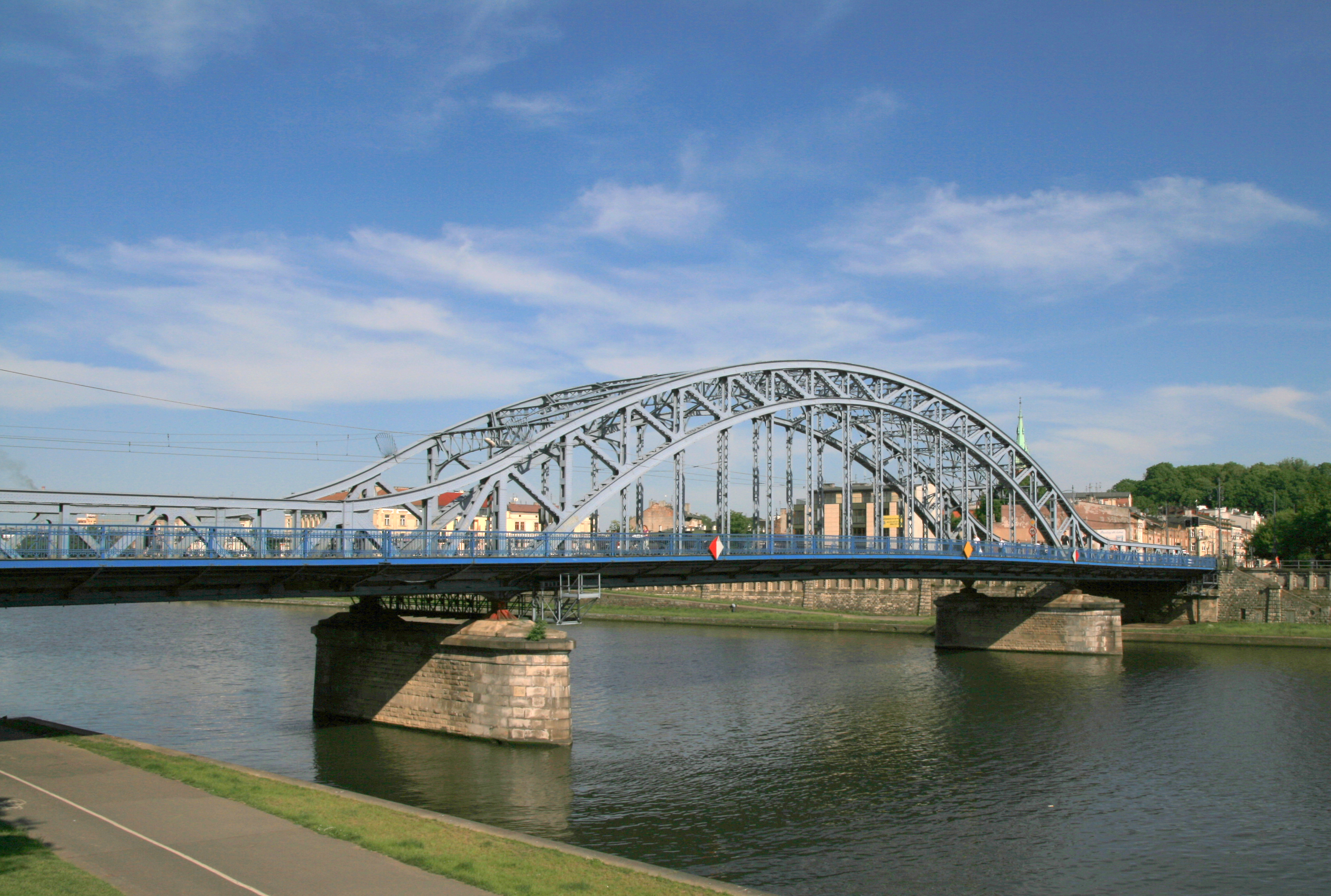 Most Józefa Piłsudskiego w Krakowie